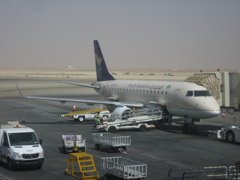 Saudi Arabian Airlines ERJ-170 at Riyadh King Khalid International Airport.